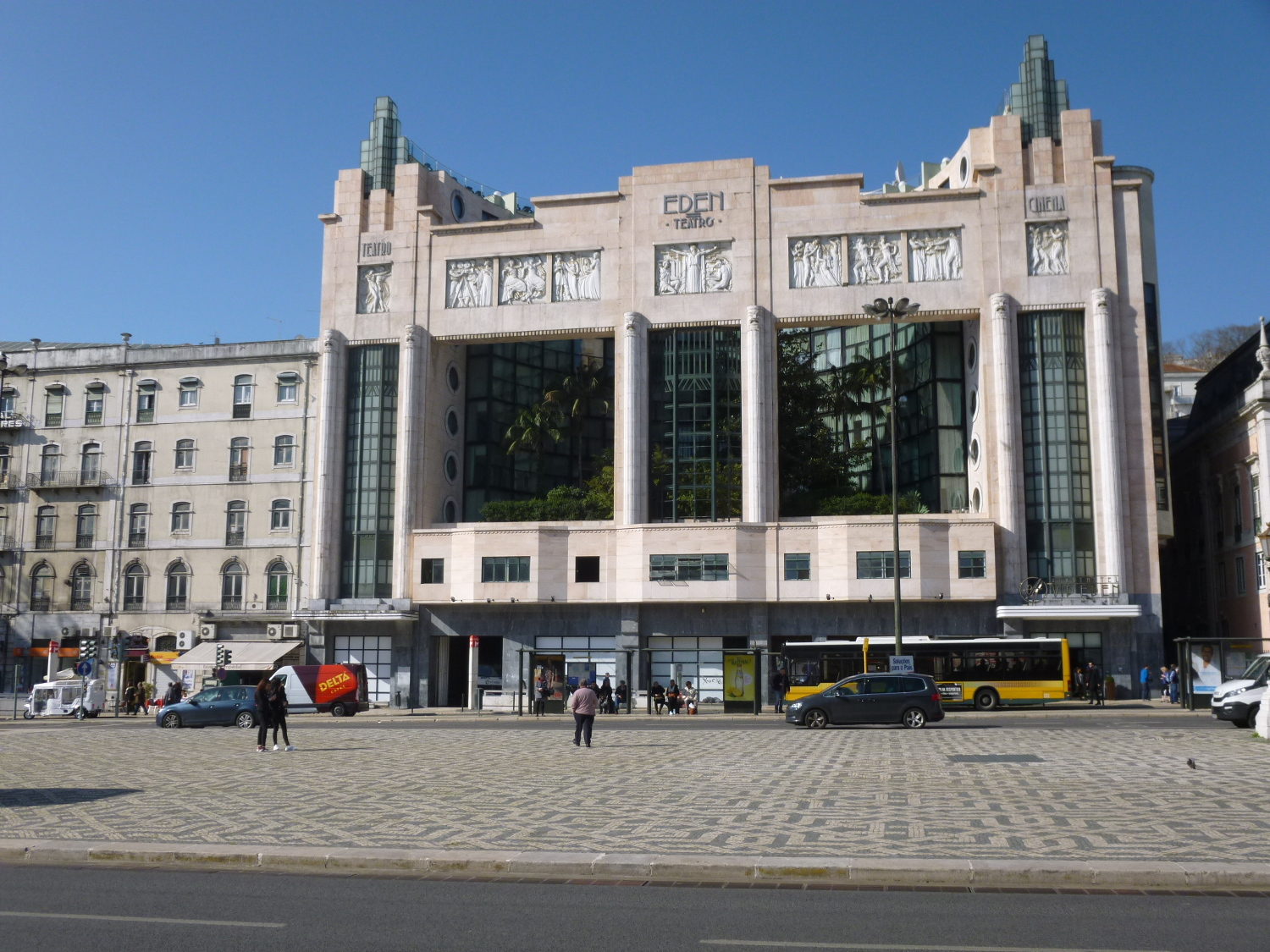 20 Restauradores